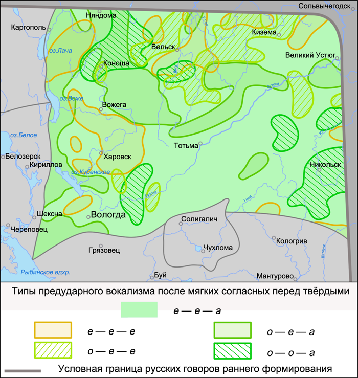 Карта распространения типов предударного вокализма после мягких согласных перед твёрдыми в вологодских говорах. Источники: Захарова К. Ф., Орлова В. Г., Сологуб А. И., Строганова Т. Ю. Образование севернорусского наречия и среднерусских говоров / Ответственный редактор В. Г. Орлова. — М.: «Наука», 1970. — С. 262 (Карта 71. Типы предударного вокализма после мягких согласных перед твёрдыми)